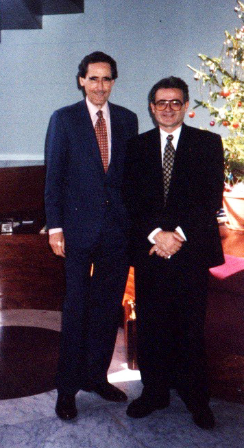 En una de las asambleas del Comité Olímpico Español, con el presidente del mismo, Carlos Ferrer Salat